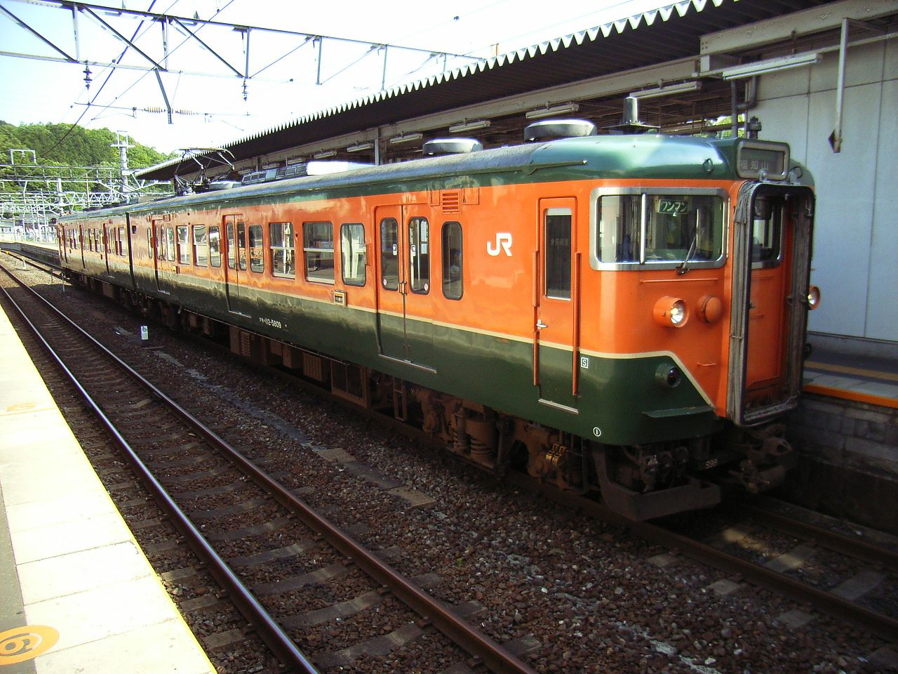 園部駅停車中のJR西日本113系5800番台。